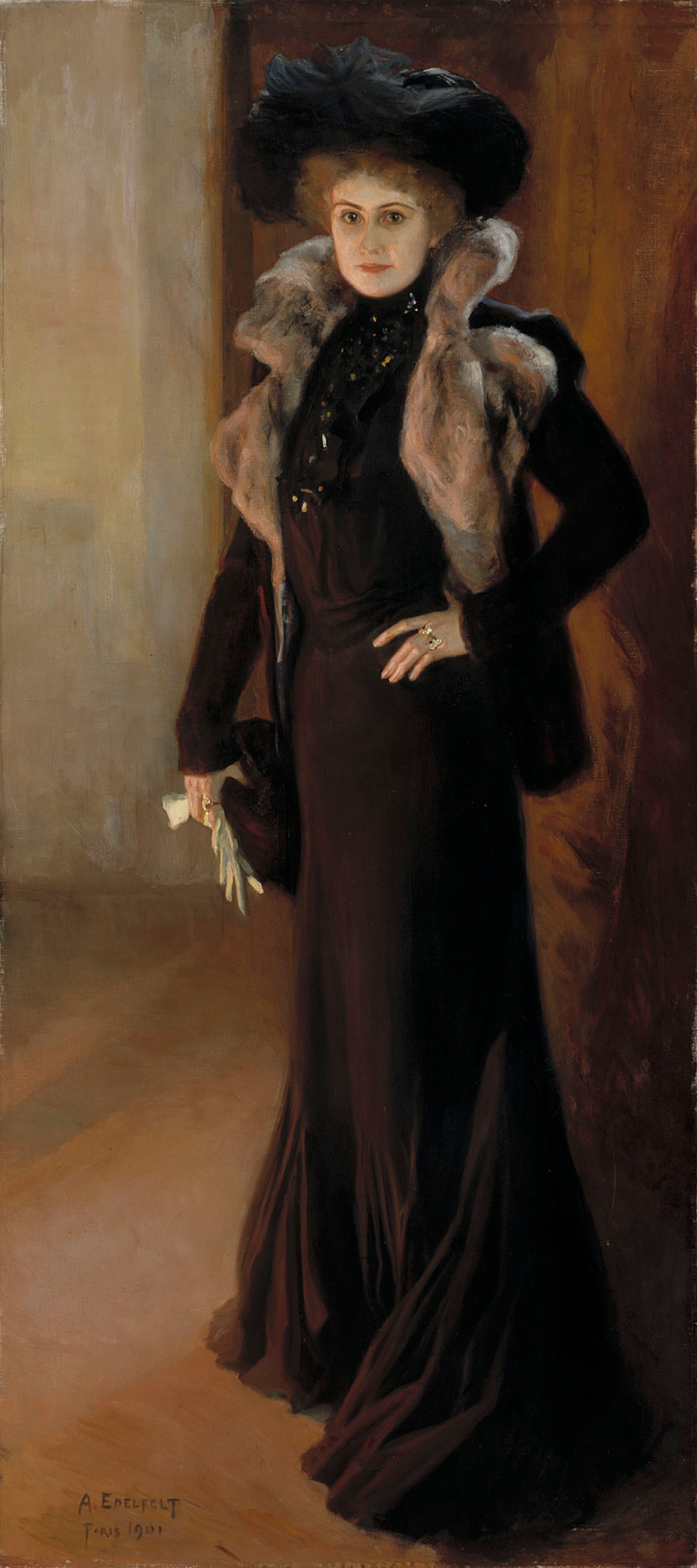 Oopperalaulaja Aino Ackté.